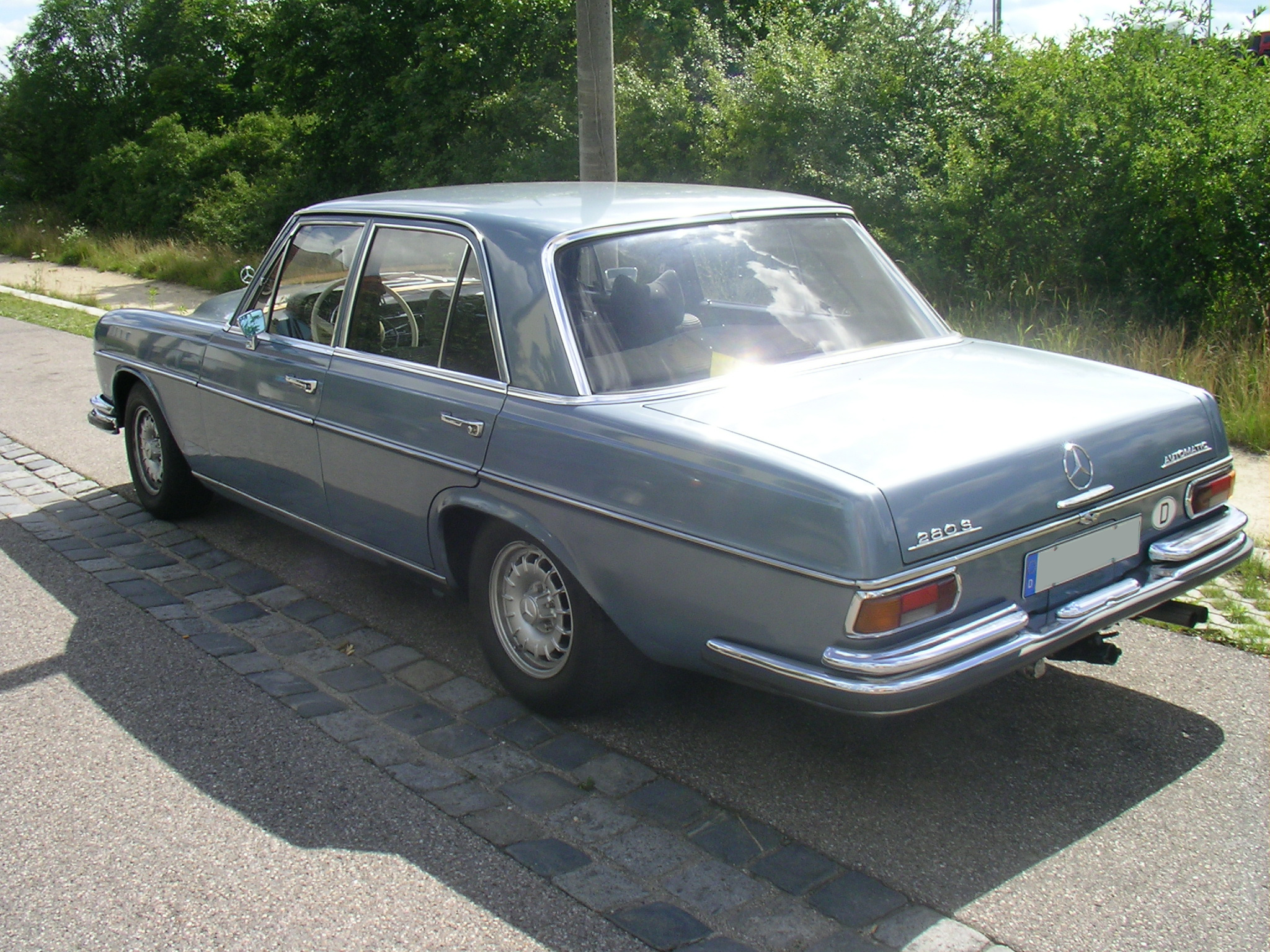 Mercedes Benz 280 S Automatic